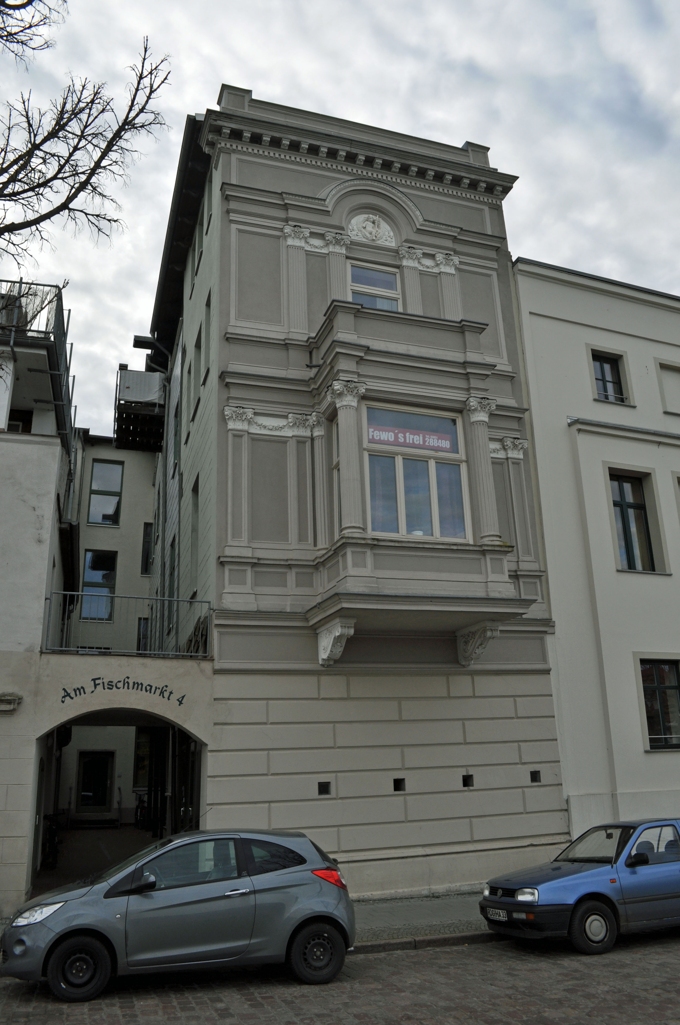 Gebäude bzw. Gebäudedetail in Stralsund. Straße und Hausnummer siehe Dateiname.